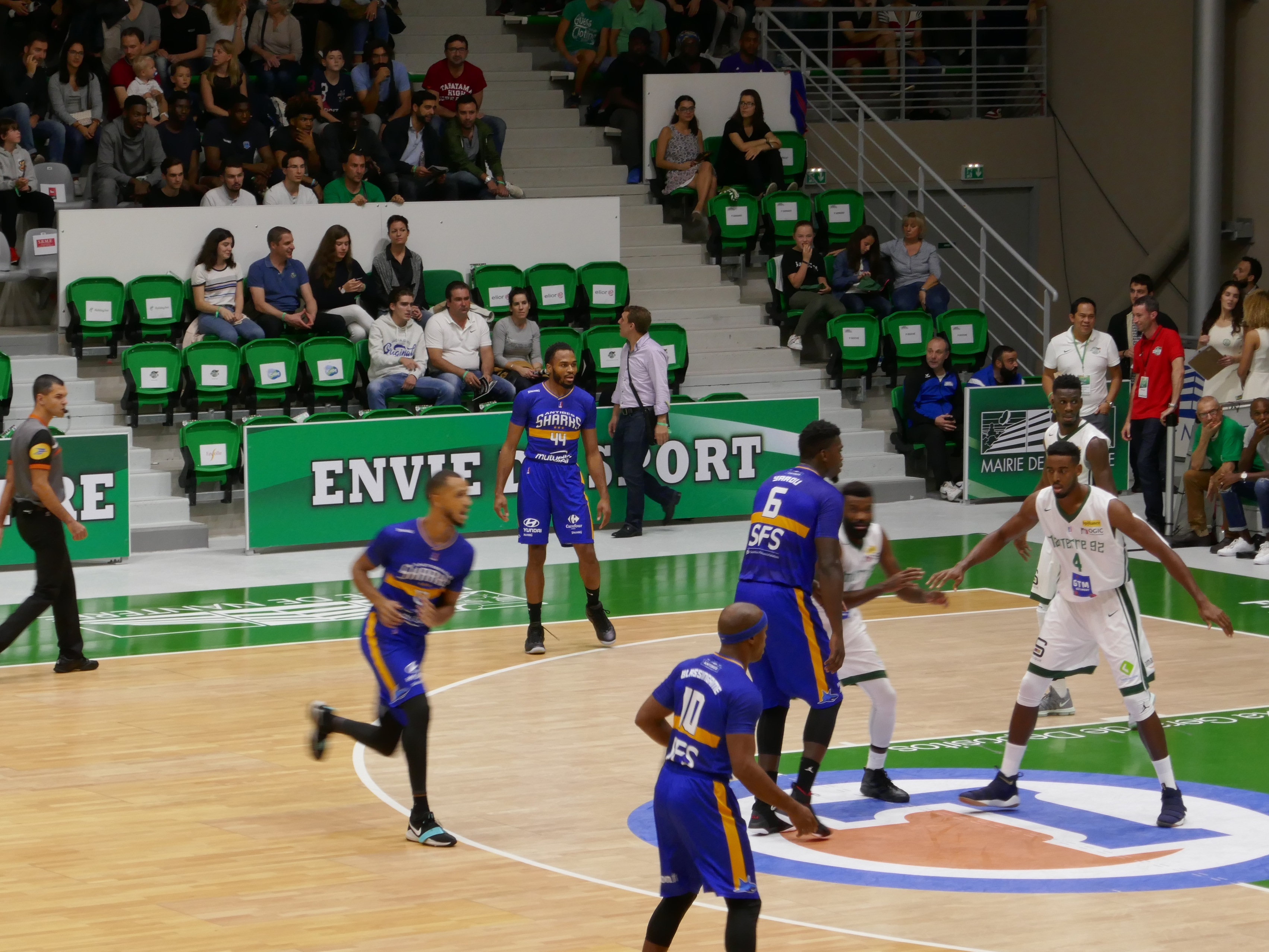 Vincent Sanford avec Antibes, en 2017.